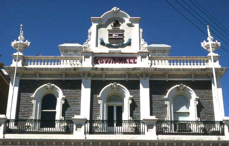 gawler, australia